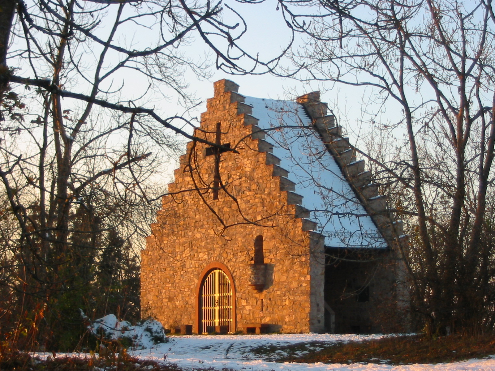 Augustinuskapelle auf dem Fürstenberg, errichtet zu Ehren von Kardinal Bea